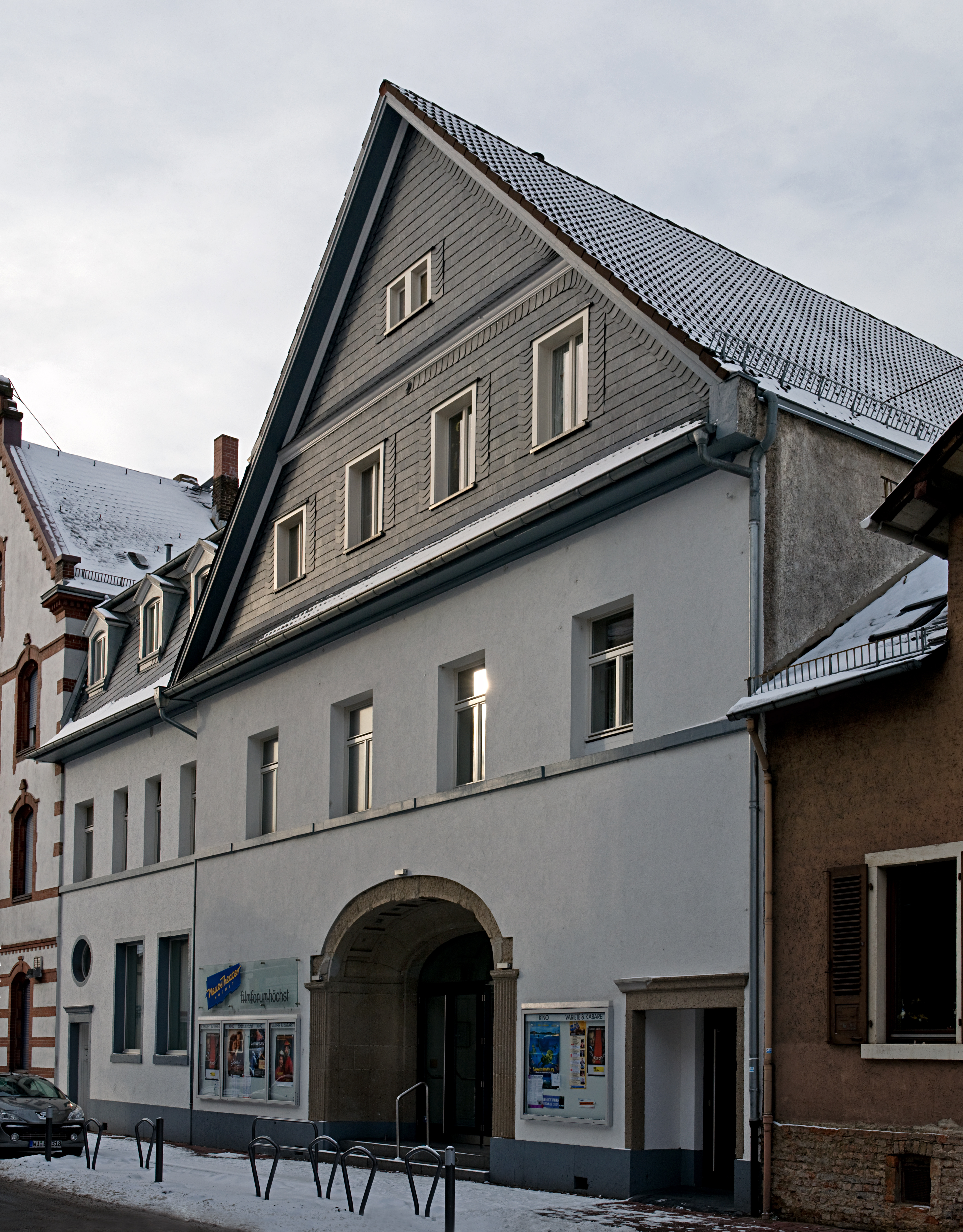 Emmerich-Josef-Strasse 46 Neues Theater und Filmforum Höchst